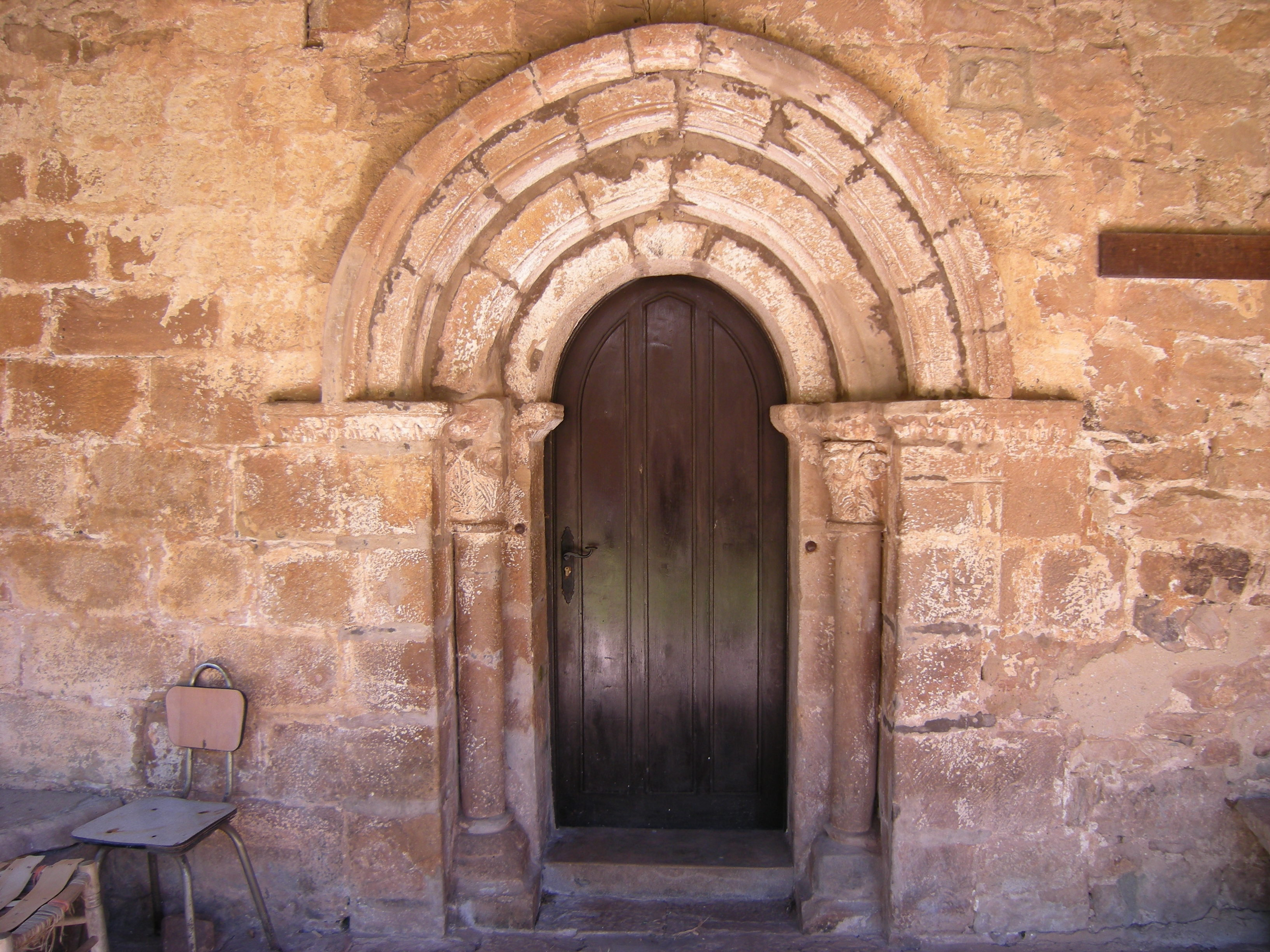 Portada meridional de la Santa Juliana de Lafuente (Cantabria, España).